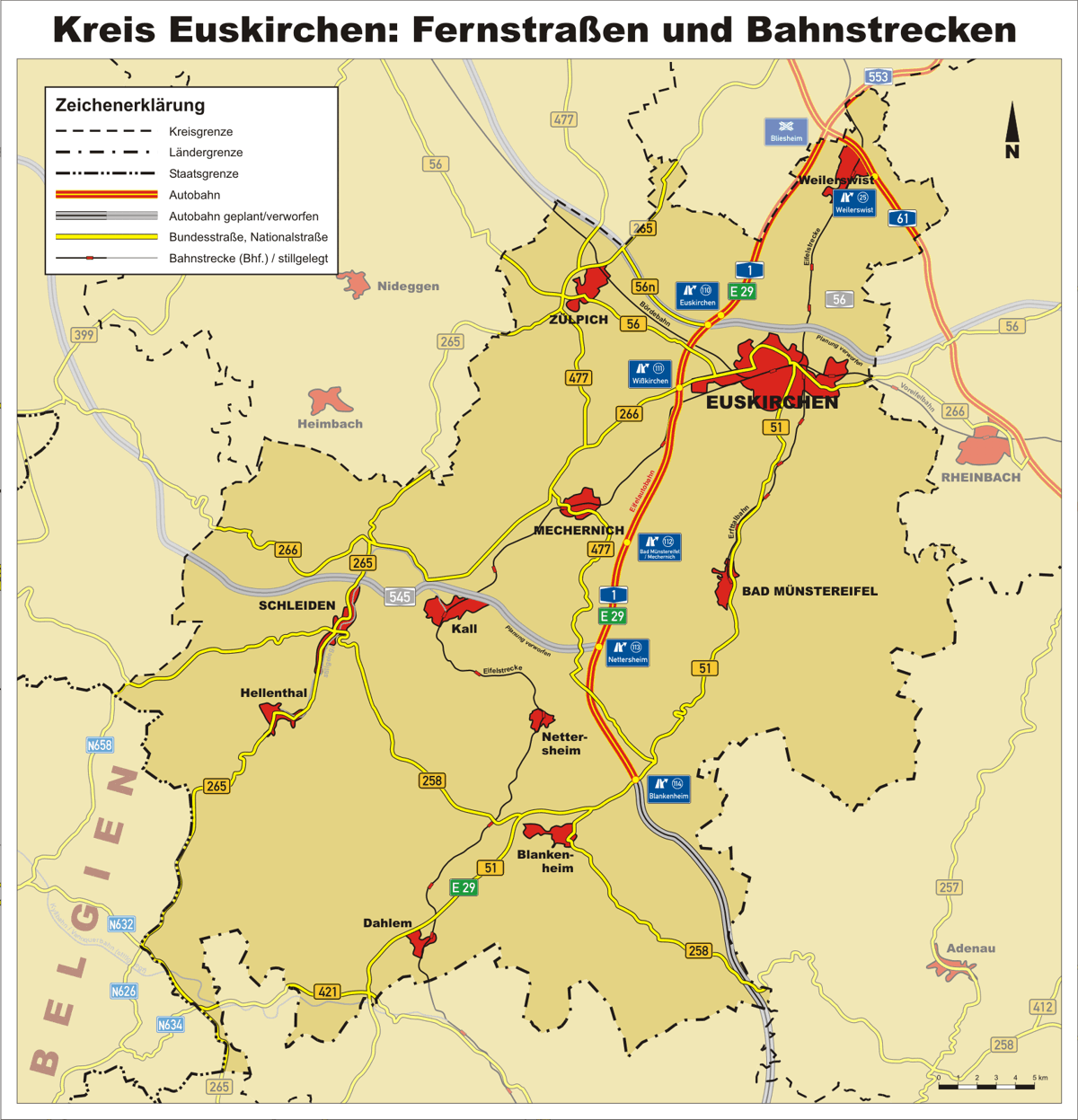 Network of Highway and Railway in District Euskirchen / Fernstraßen- und Bahnstrecken-Netz im Kreis Euskirchen